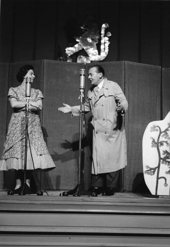 Gastspiel in Düsseldorf, 19.10.1956 Kabarett "Die Stachelschweine" Berlin Szene: Rosen und Tomaten Text: Rolf Ulrich